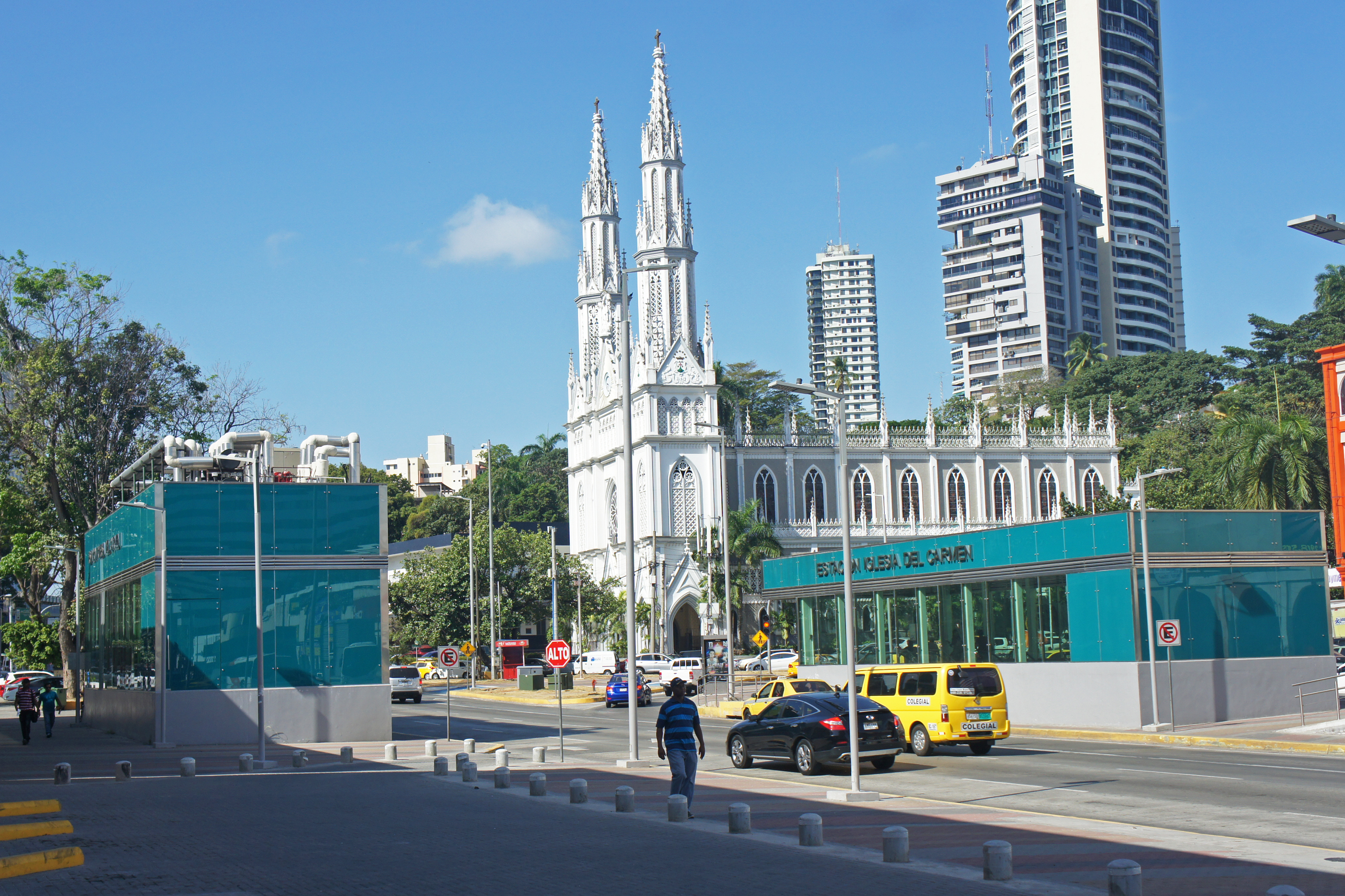 Estación El Carmen, Metro Panamá, Vía España, Ciudad Panamá..